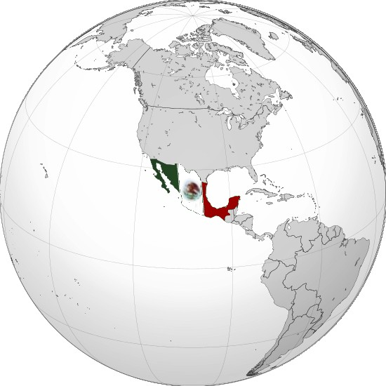 Ubicación geográfica de México en el continente Americano